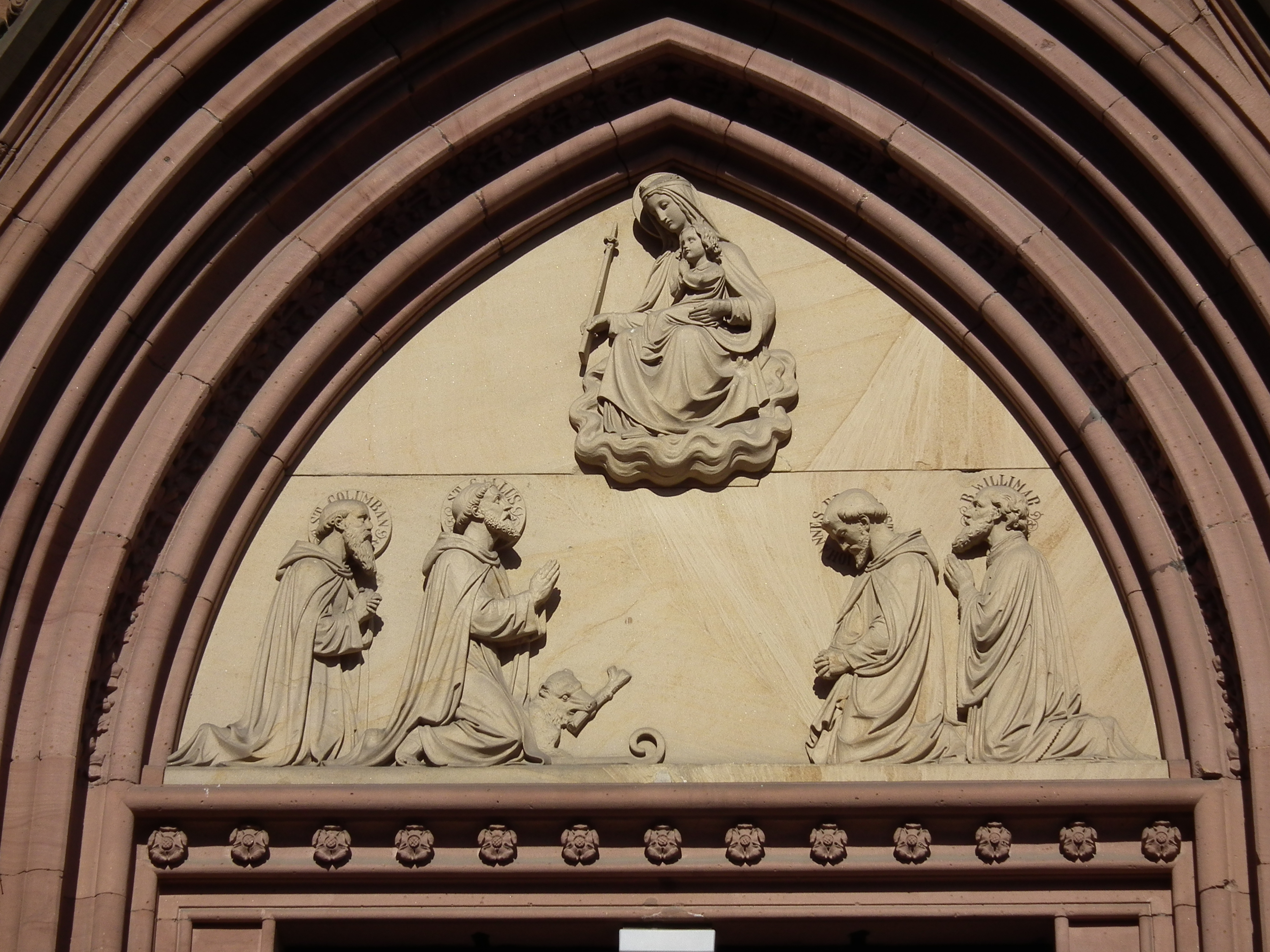 Tympanon der Westfassade der St. Gallus-Kirche in Ladenburg (Baden-Württemberg, Deutschland); oben: thronende Mutter Gottes, links die heiligen Missionare St. Columban und St. Gallus, rechts Bischof Johannes von Konstanz und Pfarrer Willimar